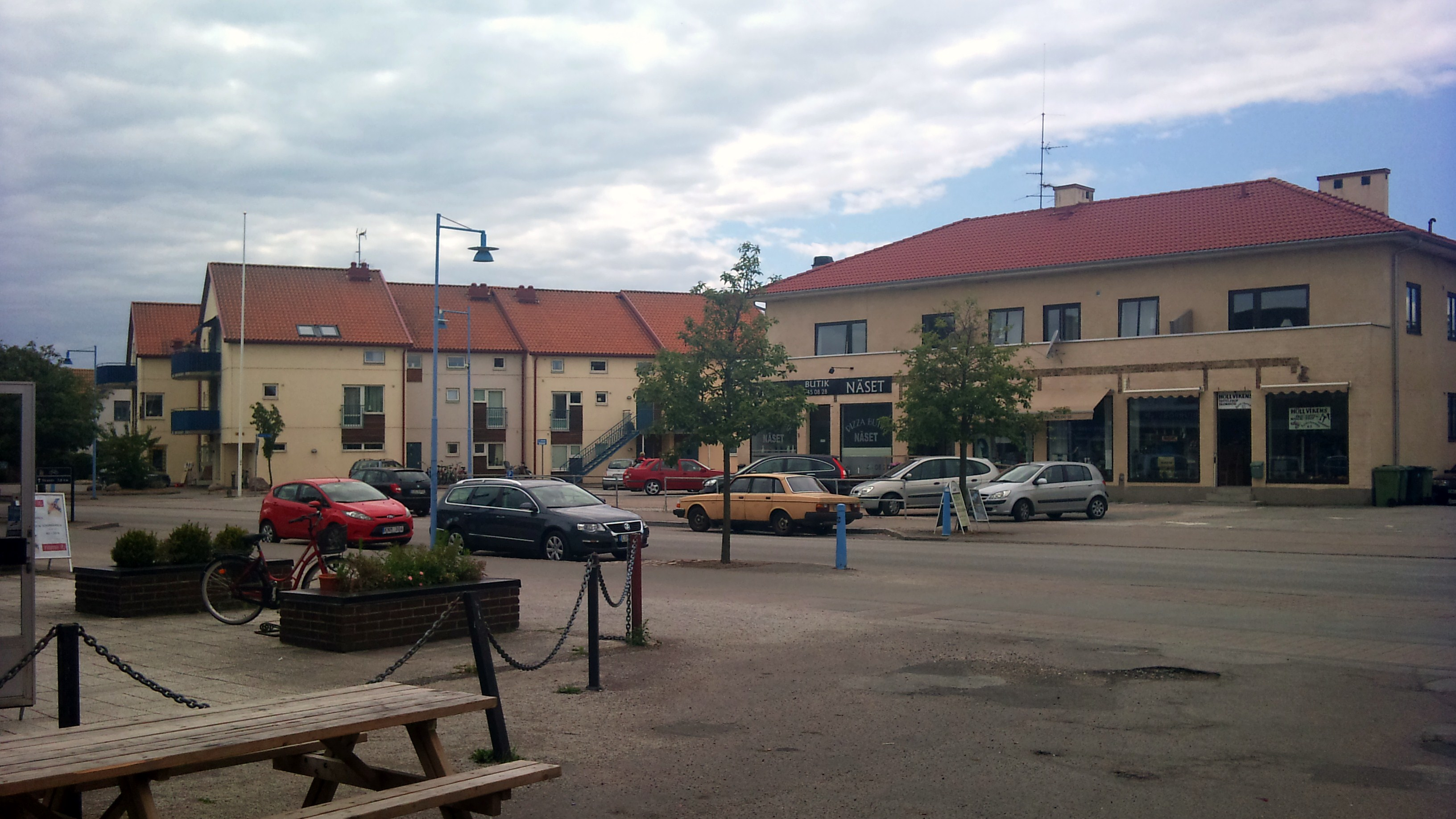 Höllviken centrum